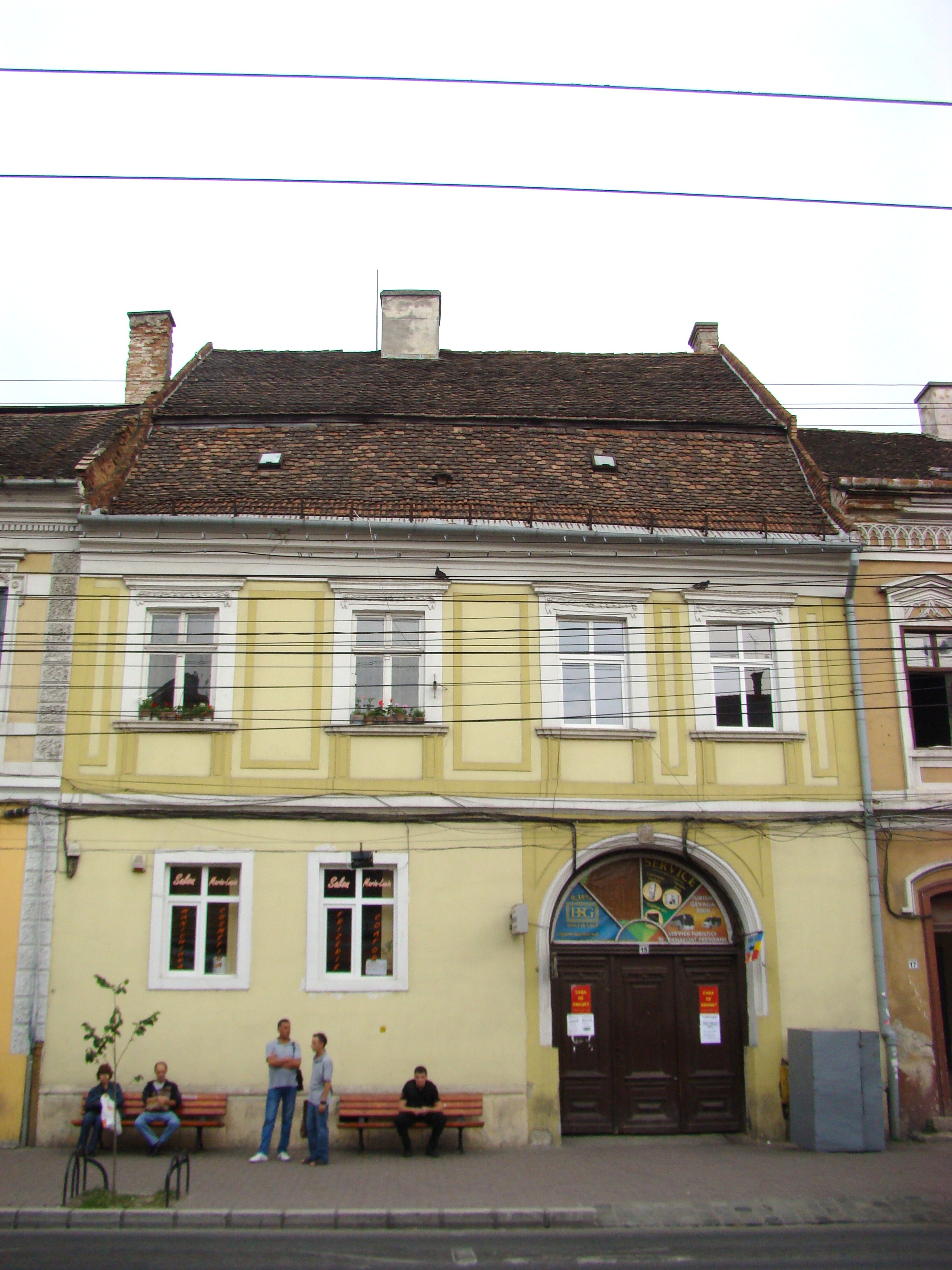 Clădire monument istoric, str. Memorandumului, nr. 15